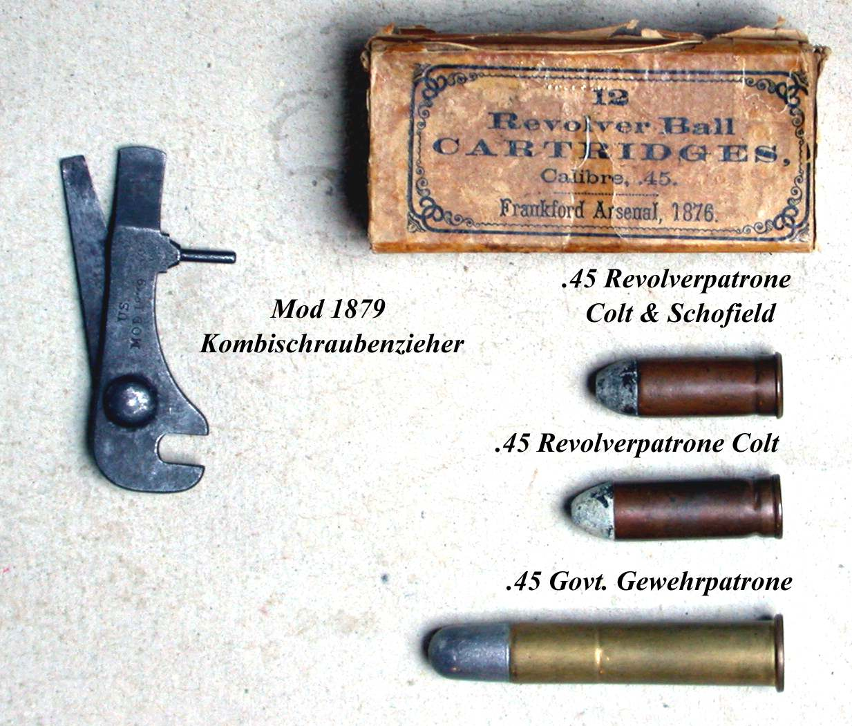 US .45 Munition und Kombiwerkzeug